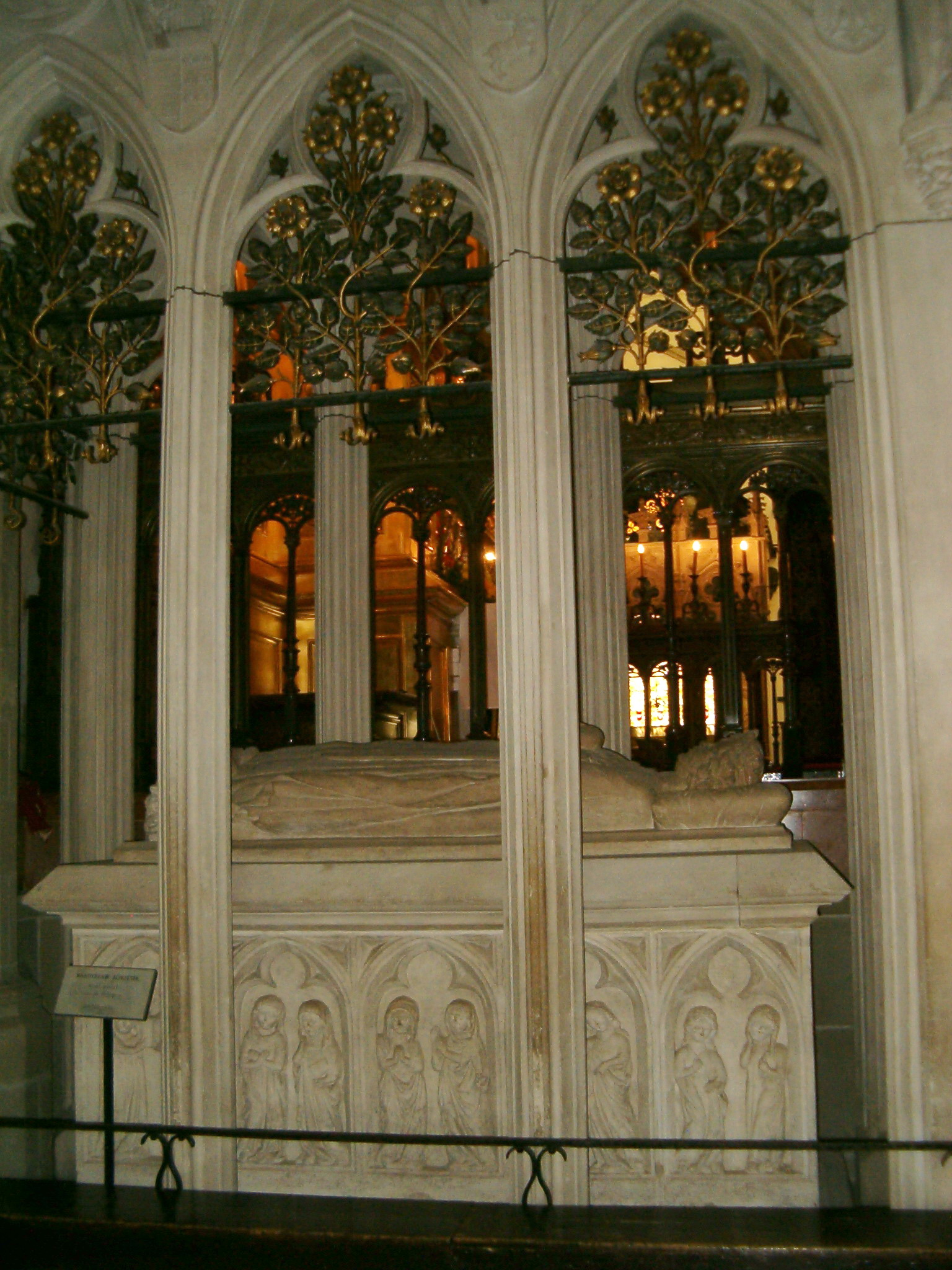 Nagrobek Władysława I Łokietka w Królewskiej Katedrze na Wawelu